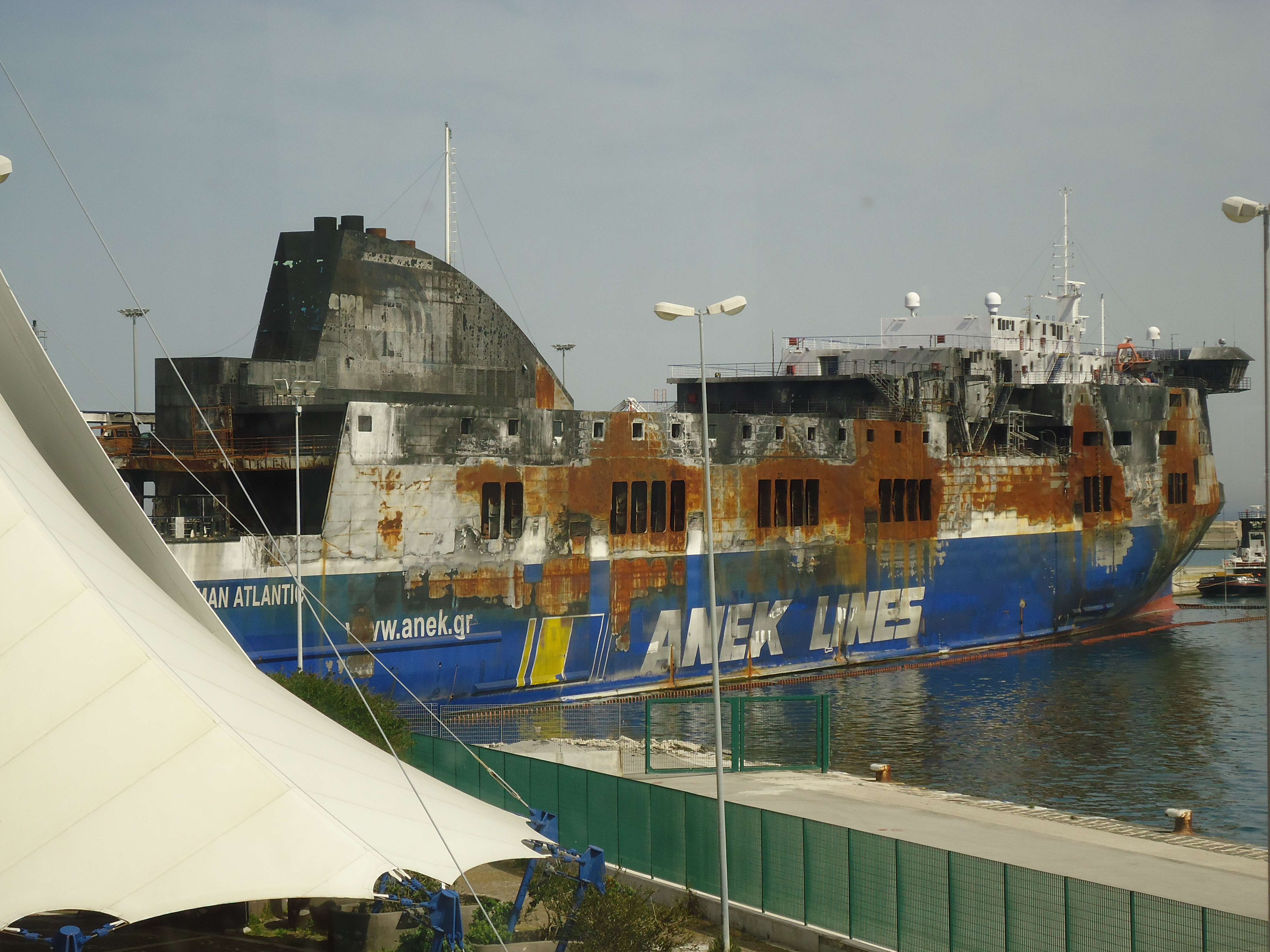 Το Νόρμαν Ατλάντικ στο λιμάνι του Μπάρι